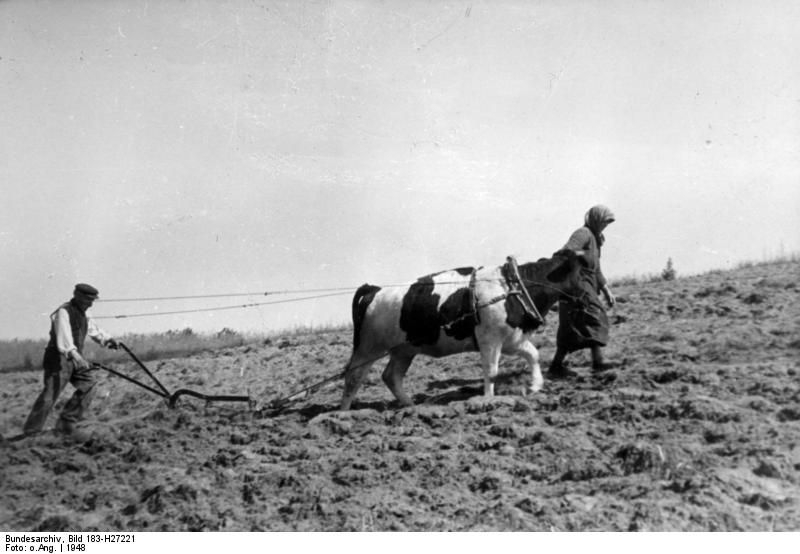 Randow / Mecklenburg, Pflügen mit dem Ochsen Zentralbild, 1948, Neubauern im Notstandsgebiet Randow, Kreis Demmin, Bezirk Neubrandenburg, pflügen mit einem Ochsen als Zugtier. 2077-48